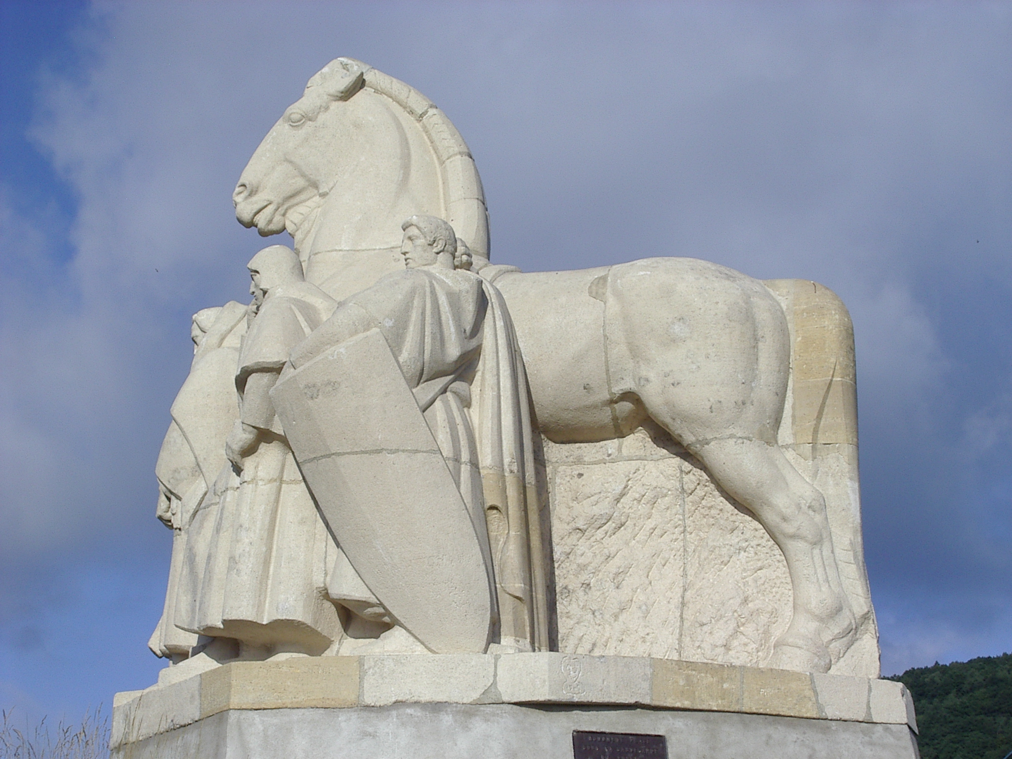 Monument des Quatre Fils Aymon, Bogny sur Meuse, Ardennes, France